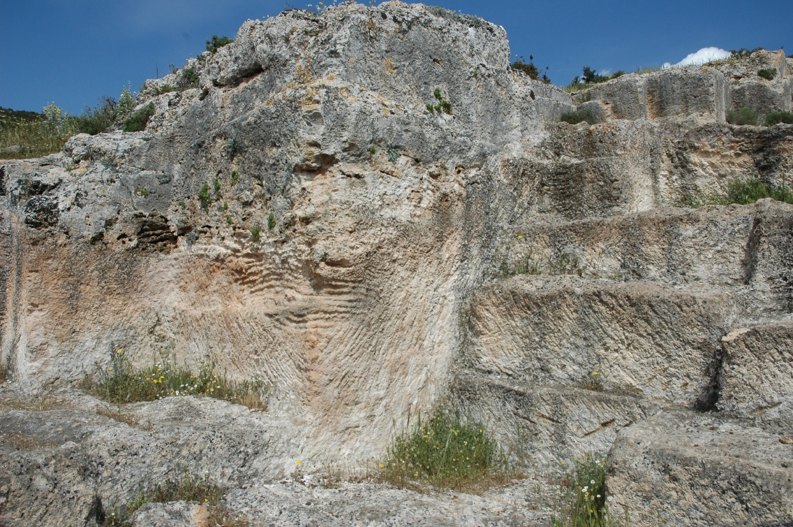 Antiker Steinbruch von Kleonai